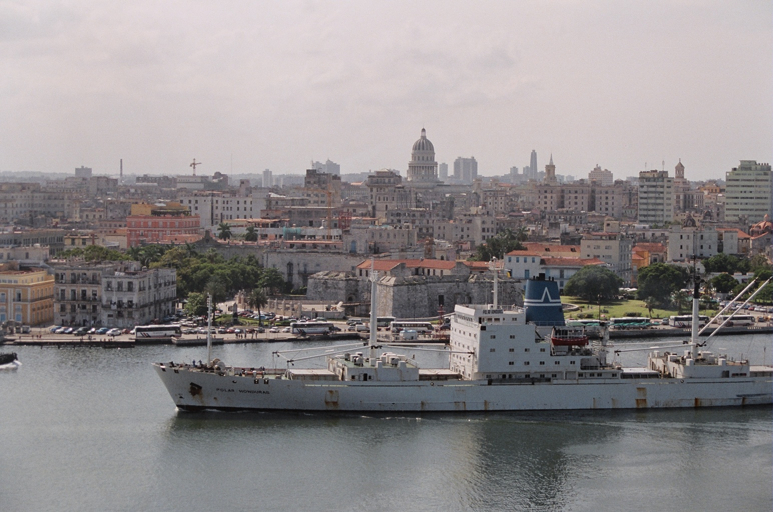 Vista de La Habana.